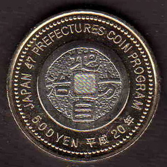 地方自治法施行60周記念貨幣の共通デザイン